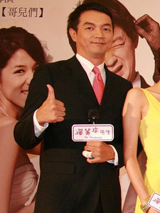 中文（台灣）: 邱彥翔出席台灣電影《彈簧床先生》首映記者會。